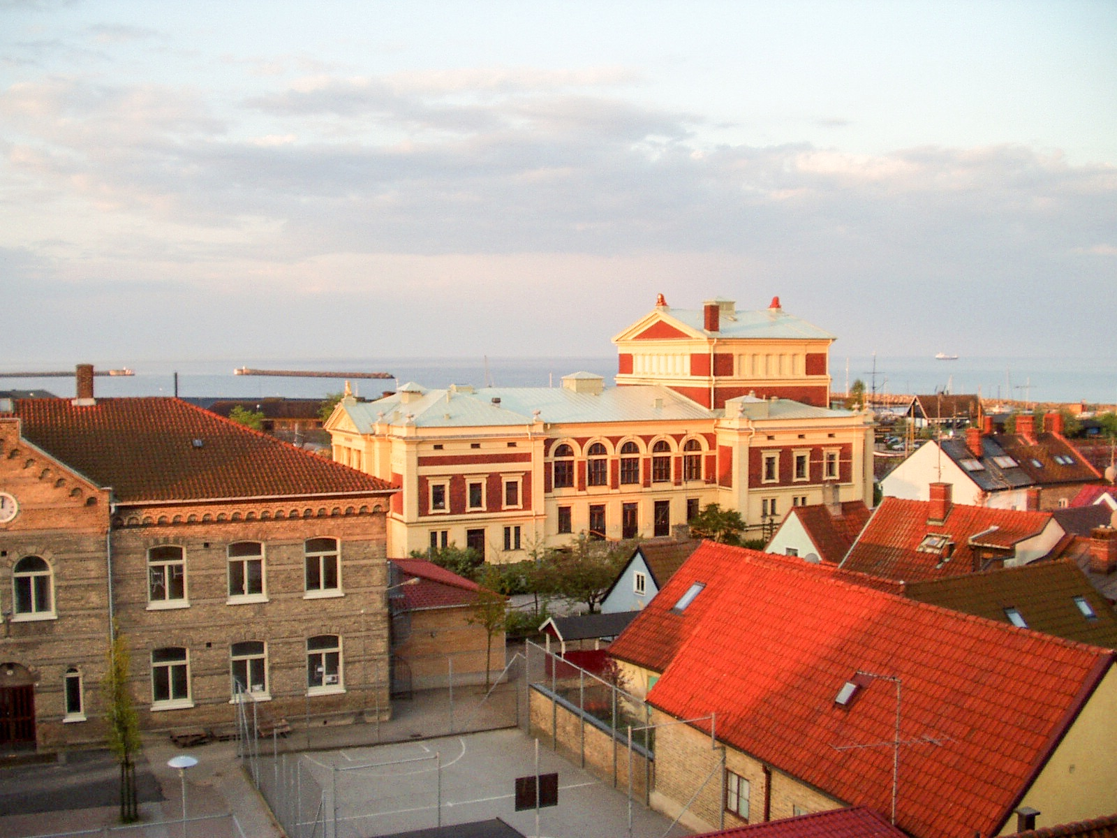 Ystadteatern och Södra skolan.